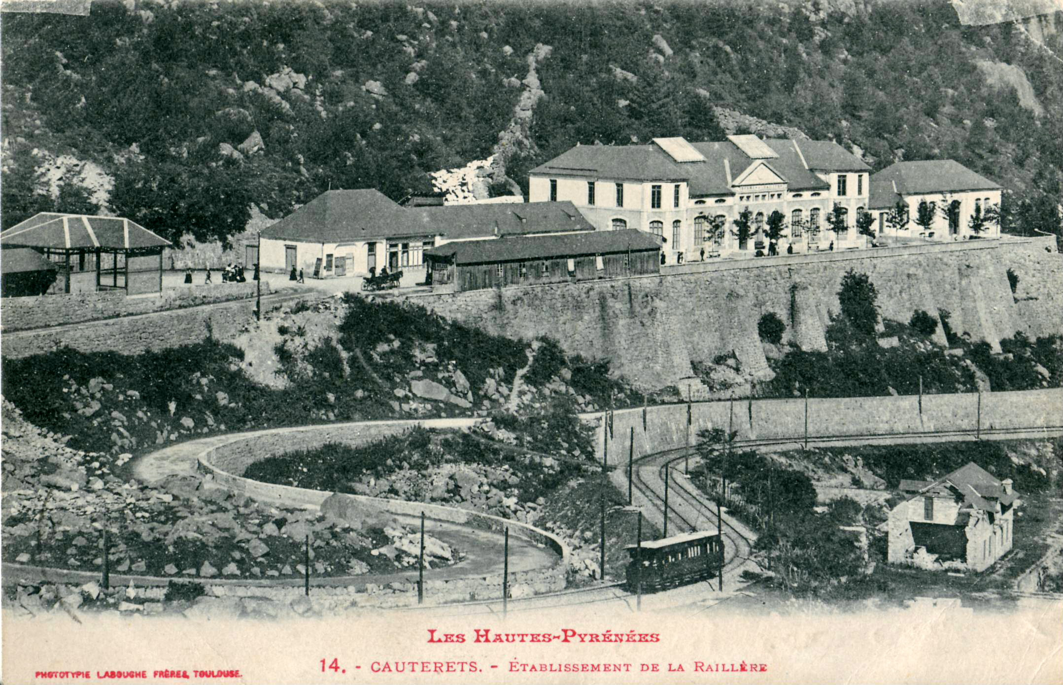 Carte postale ancienne éditée par Phototypie Labouche frères à Toulouse, collection Les Hautes-Pyrénées, n°14 : CAUTERETS - Établissement de la Raillère